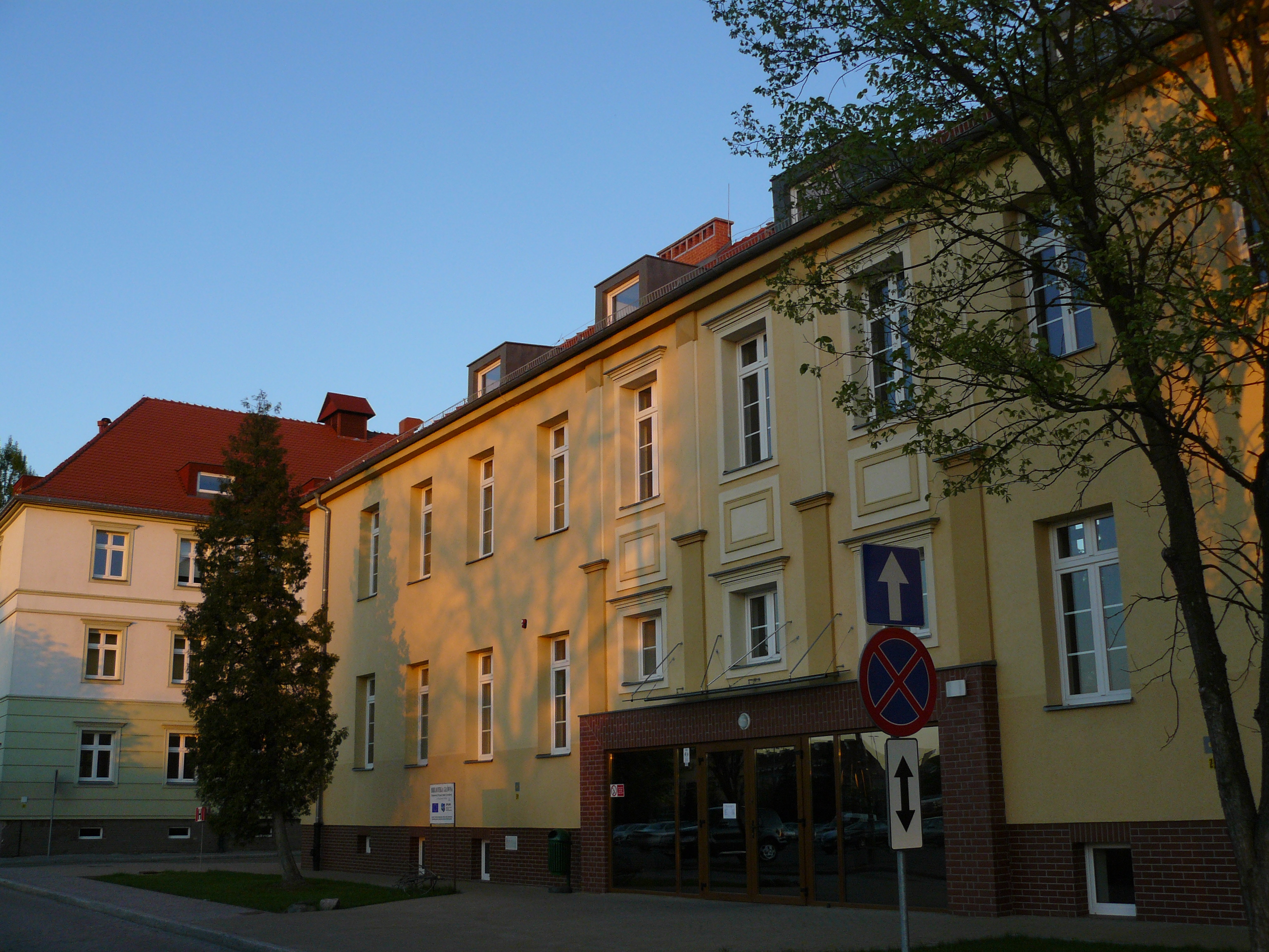 Biblioteka Główna PWSZ Gorzów Wielkopolski.